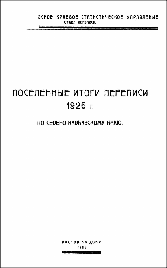 Перепись населения 1926 года. Северо-Кавказский край